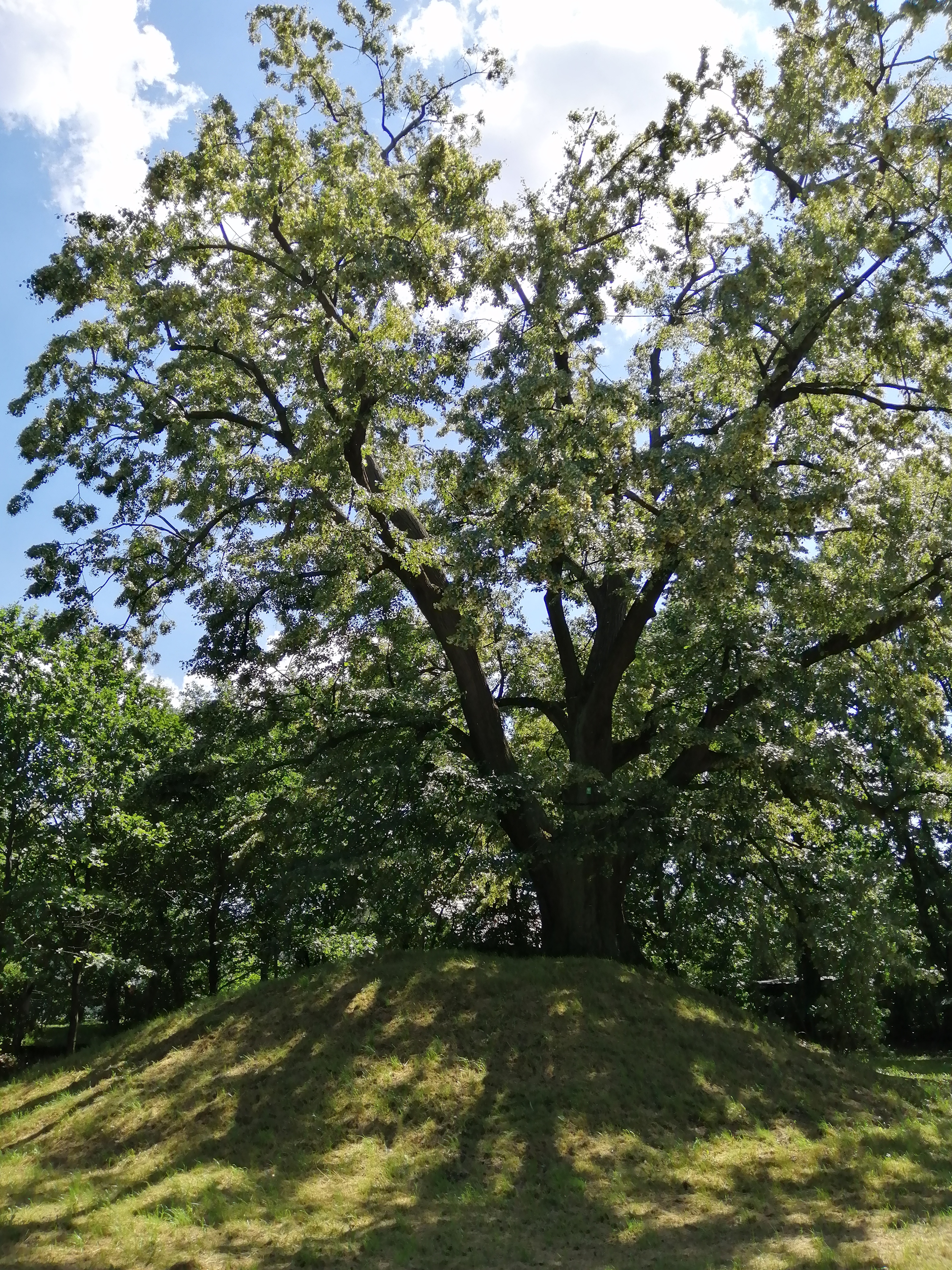 Gródek stożkowaty z XIV i pocz. XV w. z Tarnowskich Gór – Starych Tarnowic (stanowisko 8, AZP 94-46/1)